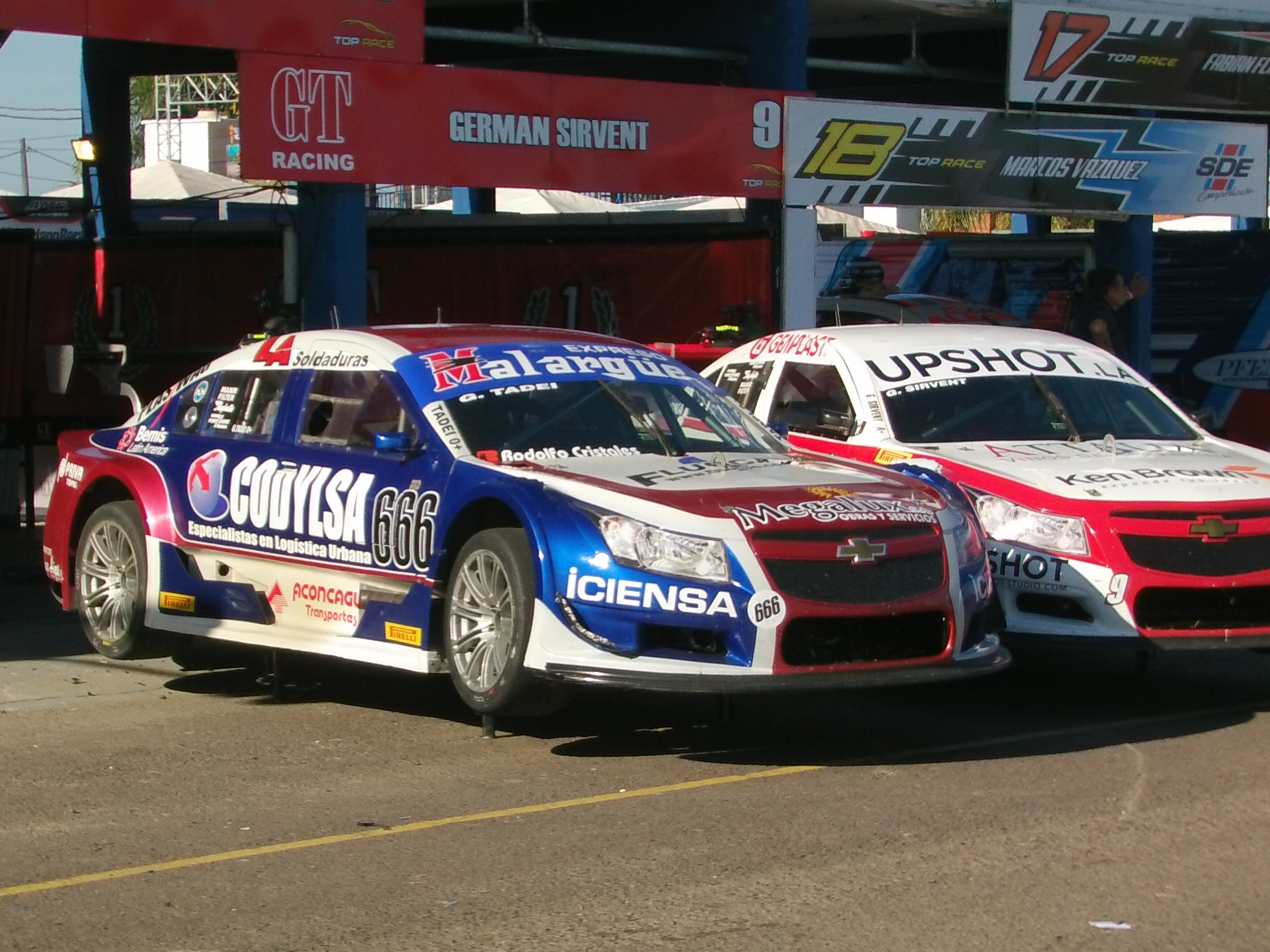 Unidades Chevrolet Cruze TRV6 del equipo GT Racing, de la categoría Argentina de automovilismo, Top Race V6